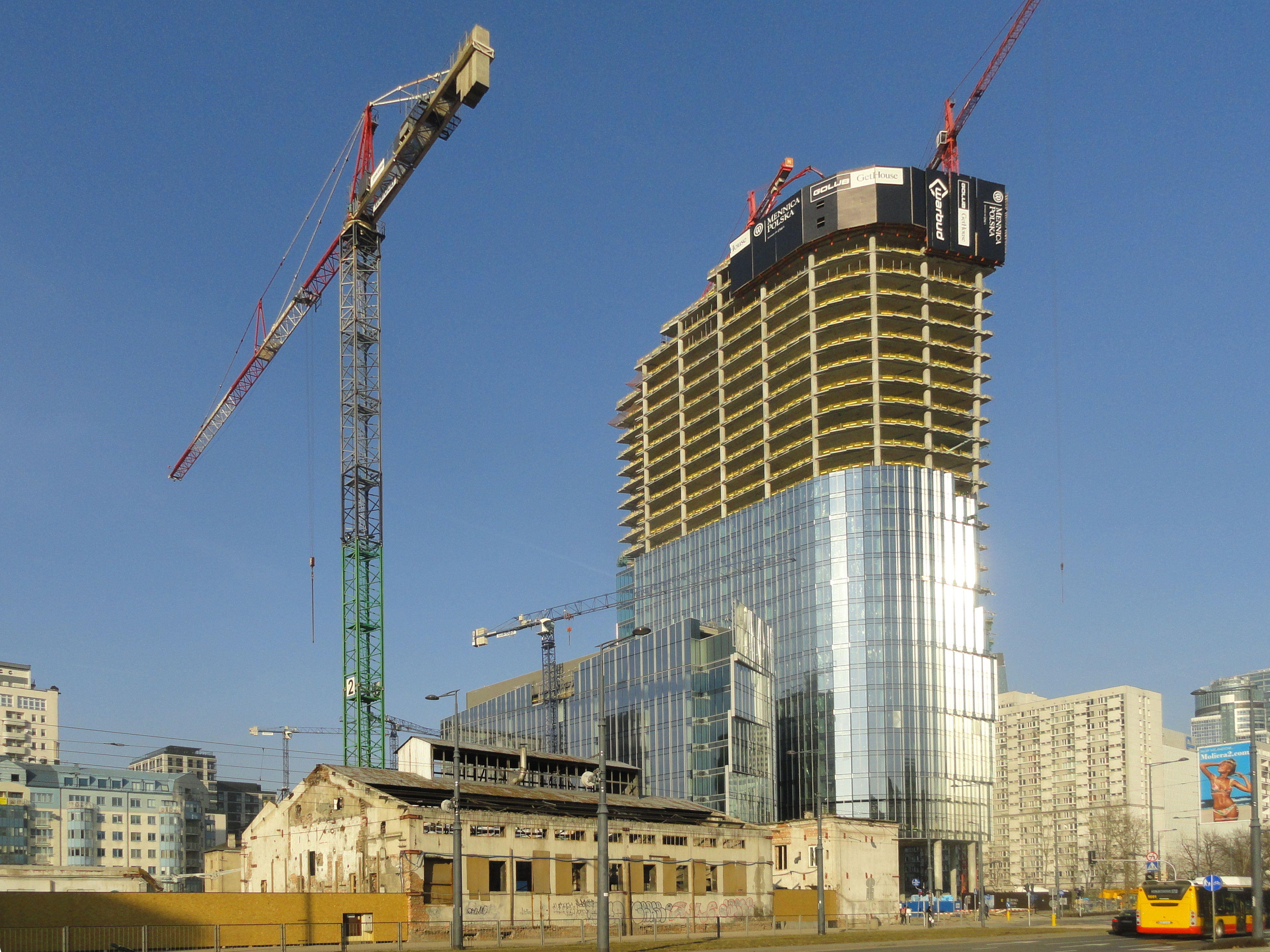 Mennica Legacy Tower na rogu ulic Prostej i Żelaznej w Warszawie.